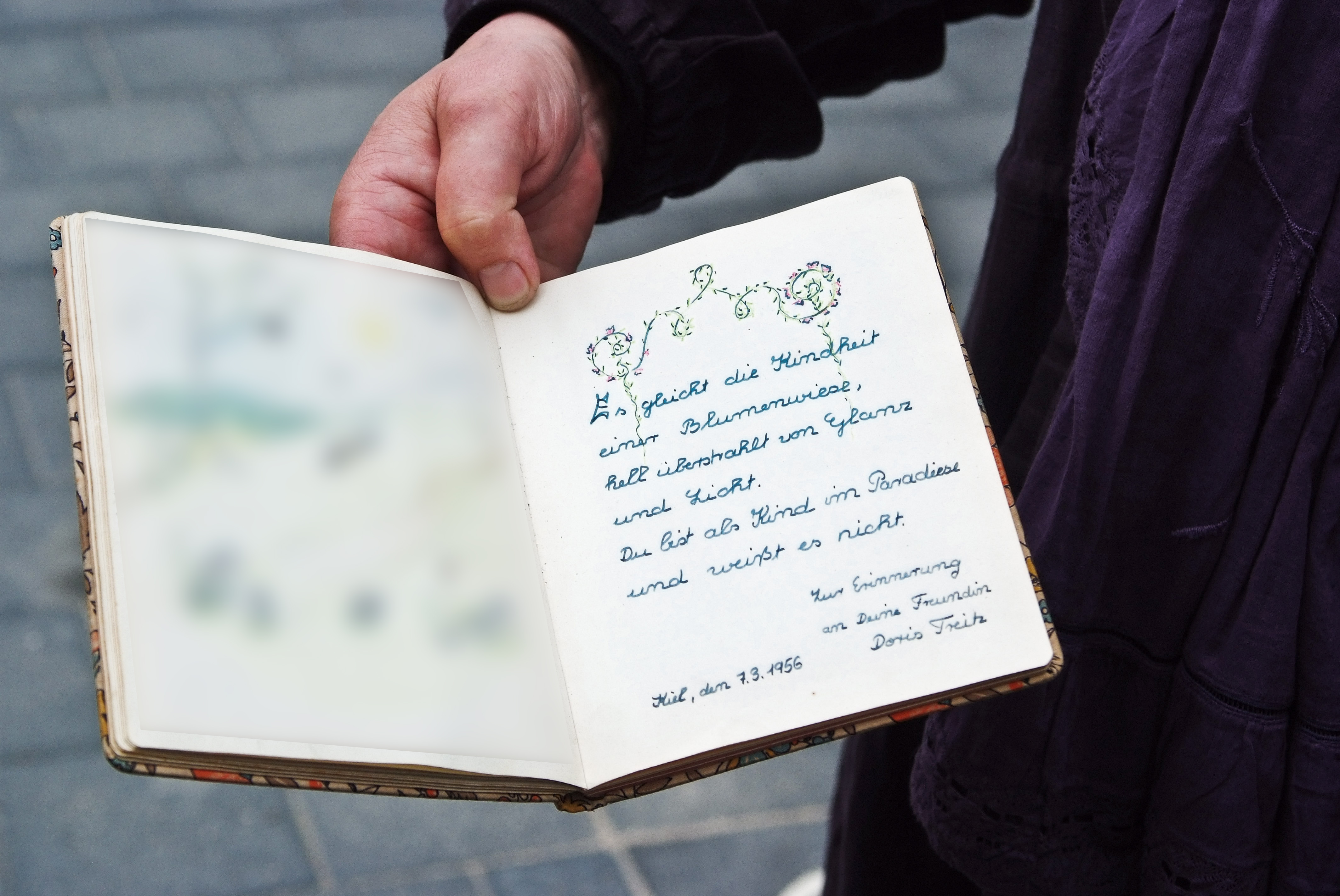 Eintrag von Doris Treitz (bekannt als Alexandra) in das Poesiealbum einer Mitschülerin am 7.3.1956. Die Zeichnung auf der linken Seite stammt ebenfalls von ihr.